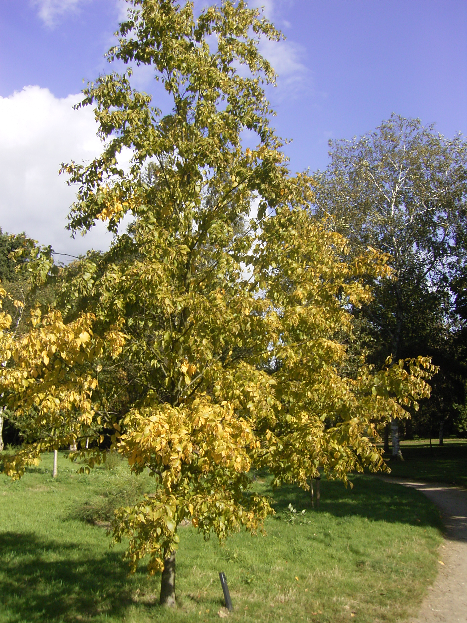 Deze foto toont de bladeren van Beta lenta ssp. lenta, in het Nederlands ook wel suikerberk genoemd. Ik nam de foto in het universiteitsarboretum Belmonte in Wageningen. This pic shows the trunc of Beta lenta ssp lenta. I took the photo in the university arboretum in Wageningen.